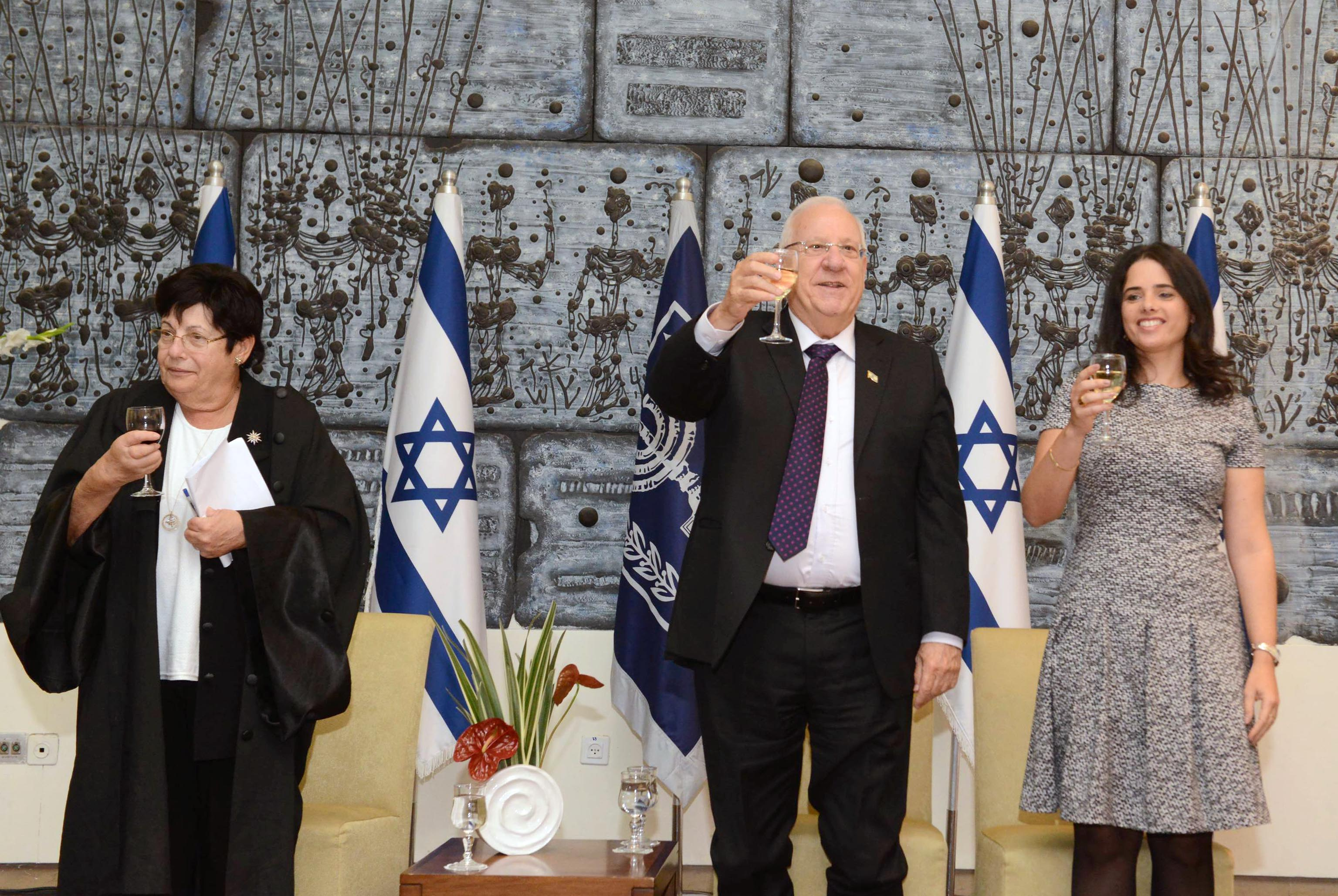 טקס השבעת שופטים בית משפט שלום ומחוזי שהתקיים בבית נשיא מדינת ישראל ראובן ריבלין בתמונה מימין לשמאל איילת שקד שרת המשפטים, ראובן ריבלין ומרים נאור נשיאת בית המשפט העליון